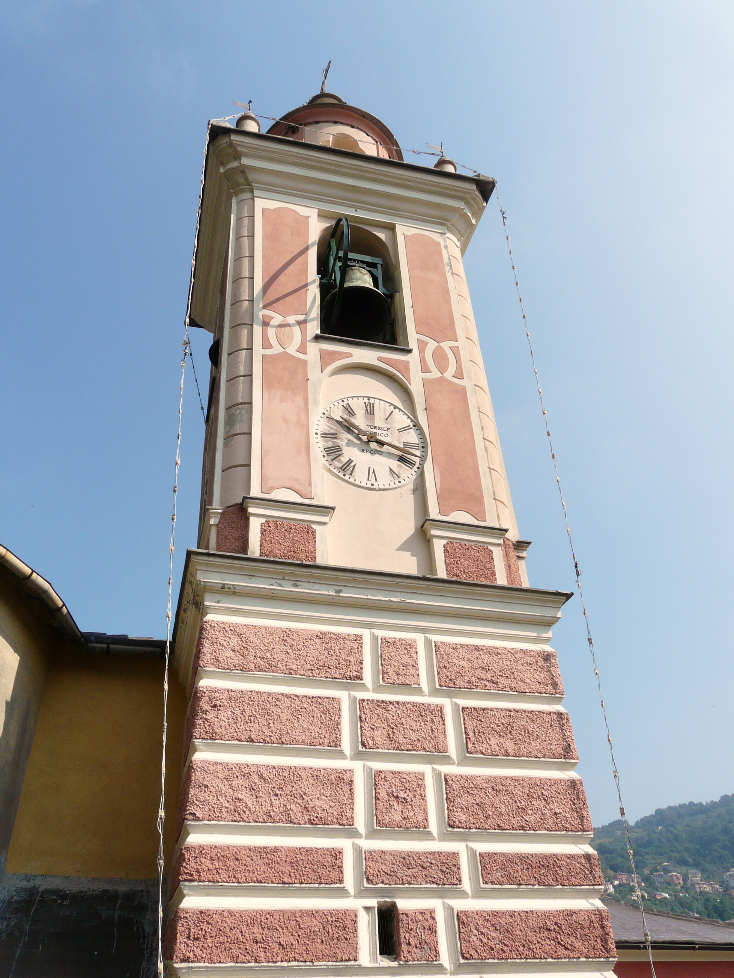 Chiesa di San Rocco presso la frazione Terrile, Uscio, Liguria, Italia